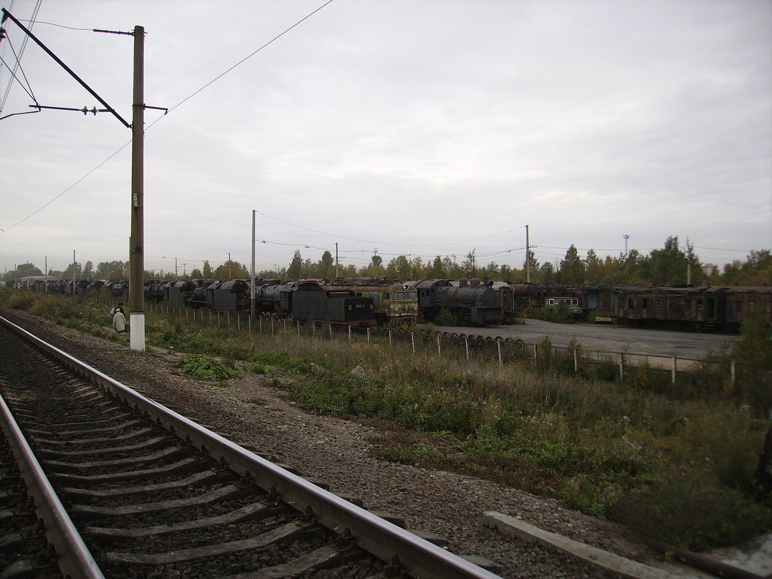 Железнодорожная платформа «Паровозный музей». База запаса музея железнодорожной техники.